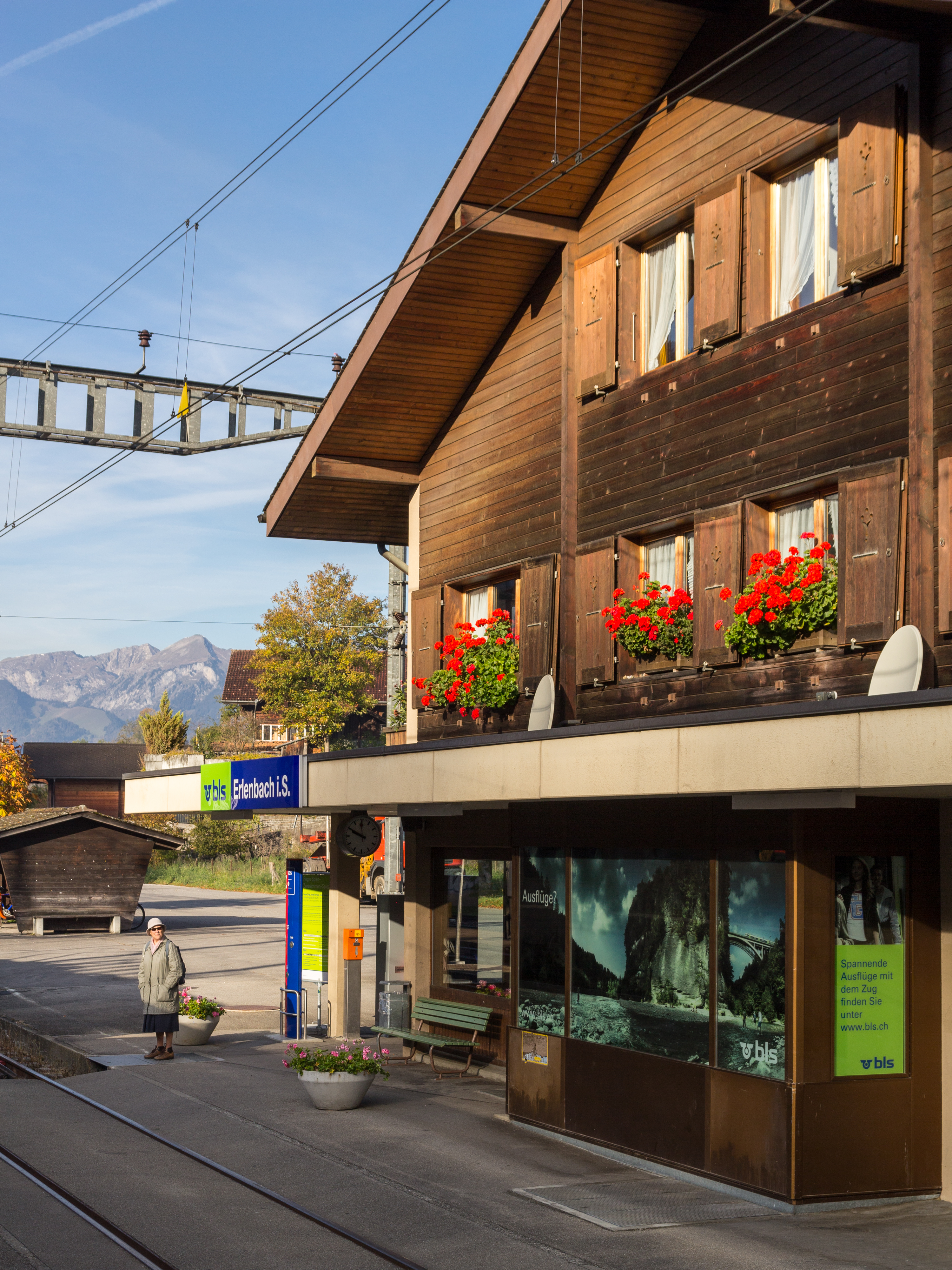 Bahnhof Erlenbach i. Simmental